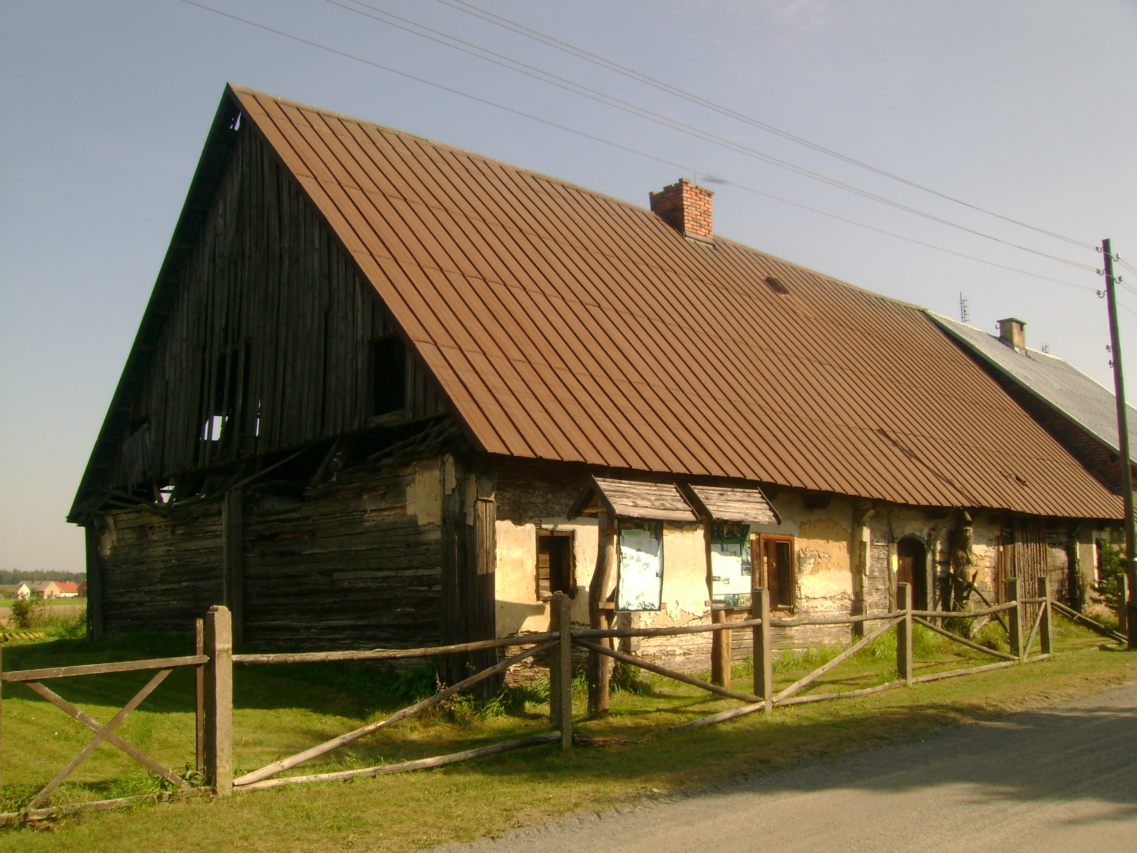 Zborowskie, fabryka fajek z czasu przedwojennych jedyna przetrwała w Europie, pilnie potrzebuje remontu.